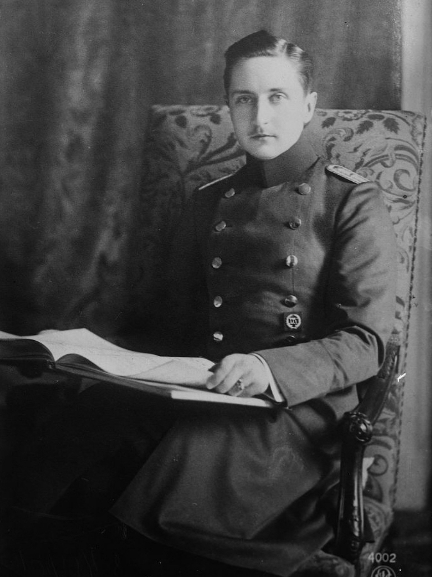 Portait von August Wilhelm von Preußen.